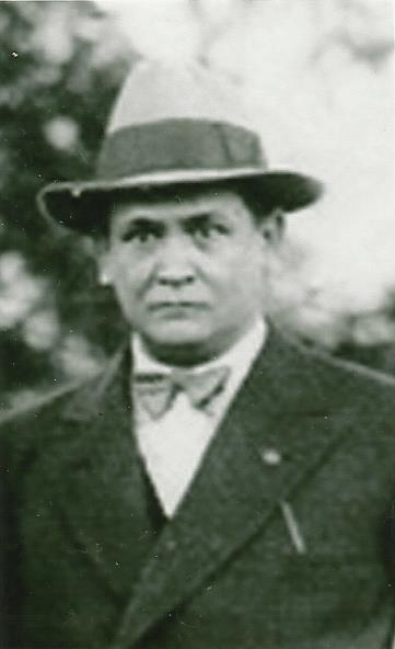 Enrique López Bustamante en 1921